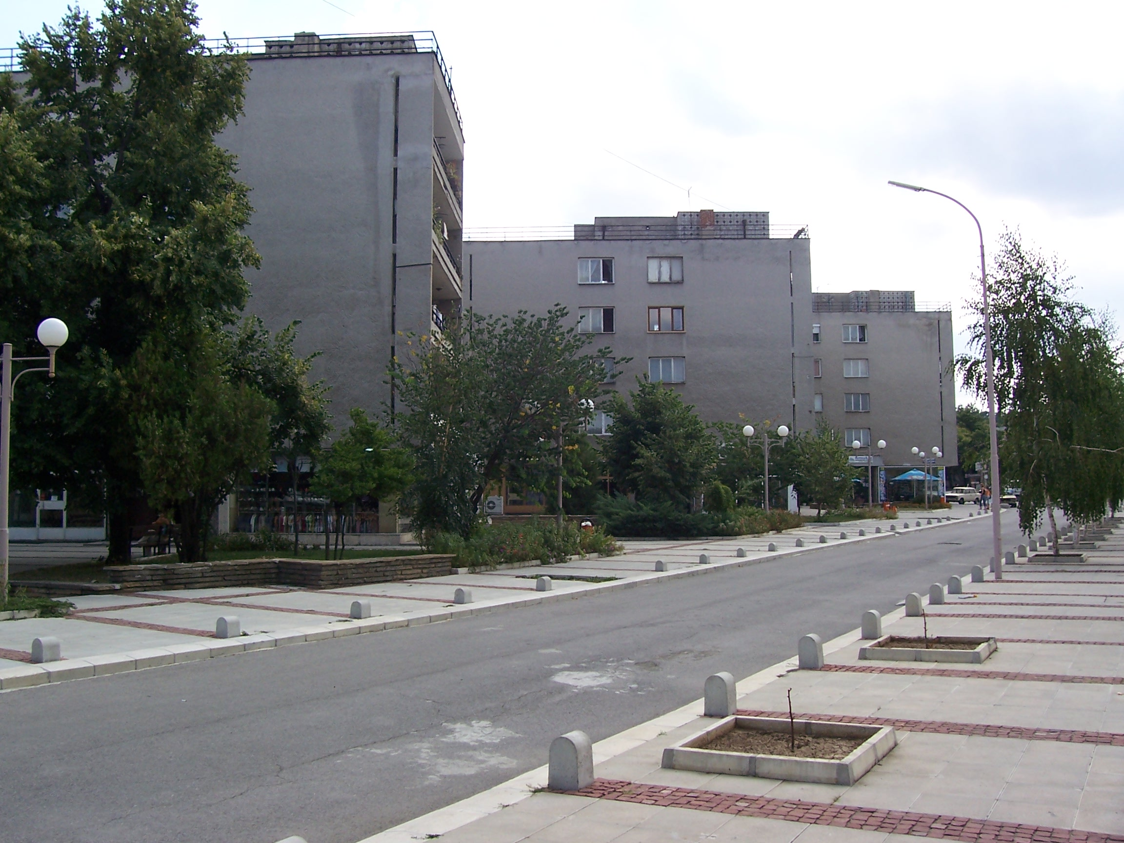 ул."Тодор Каблешков"; © 2006 Димитър Колев